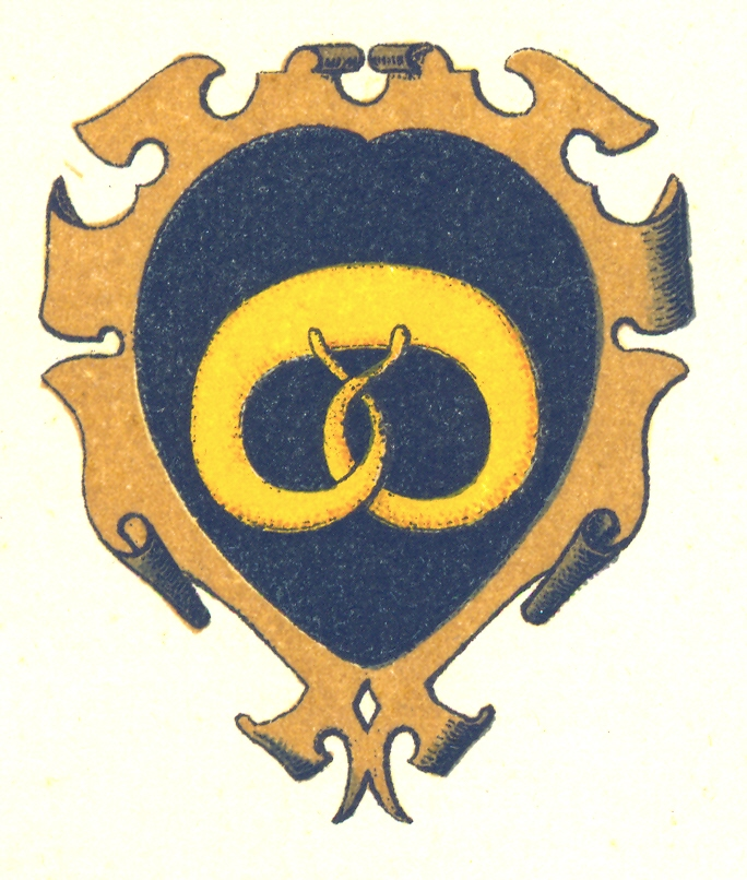 Zunftwappen Bäcker